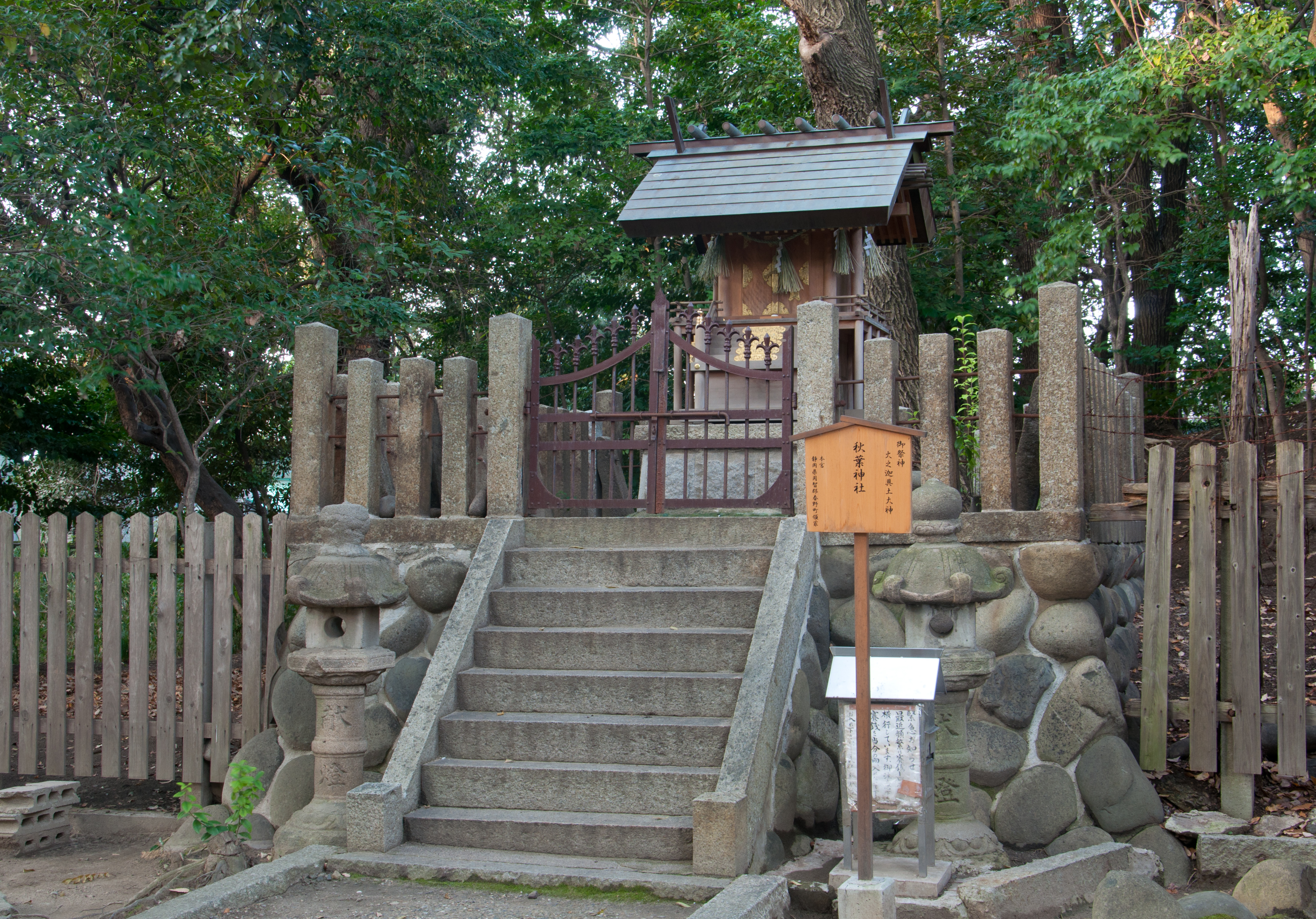 愛知県名古屋市南区呼続にある桜神明神社の境内にある秋葉社